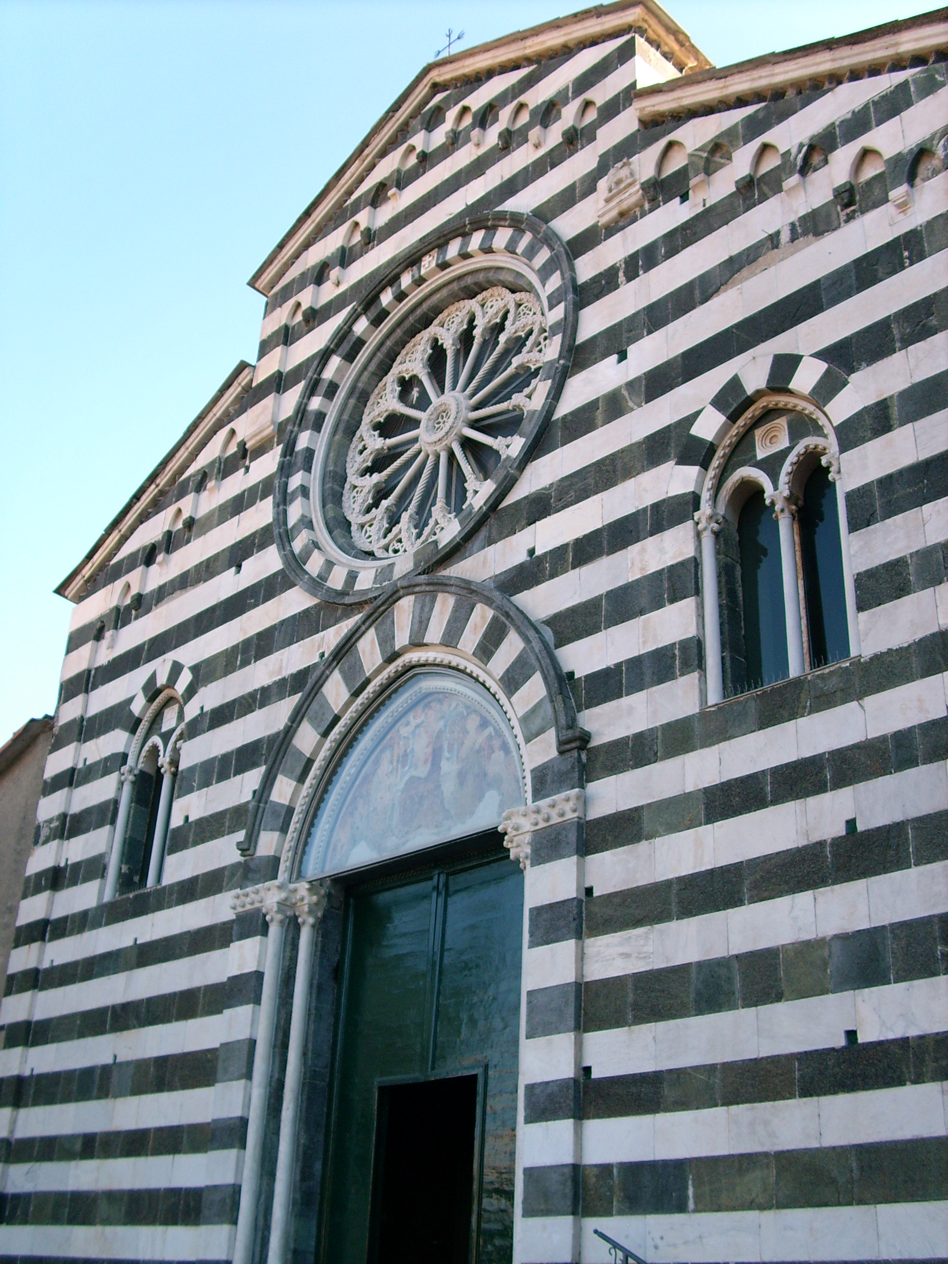 Chiesa di Sant'Andrea Apostolo di Levanto, Liguria, Italia